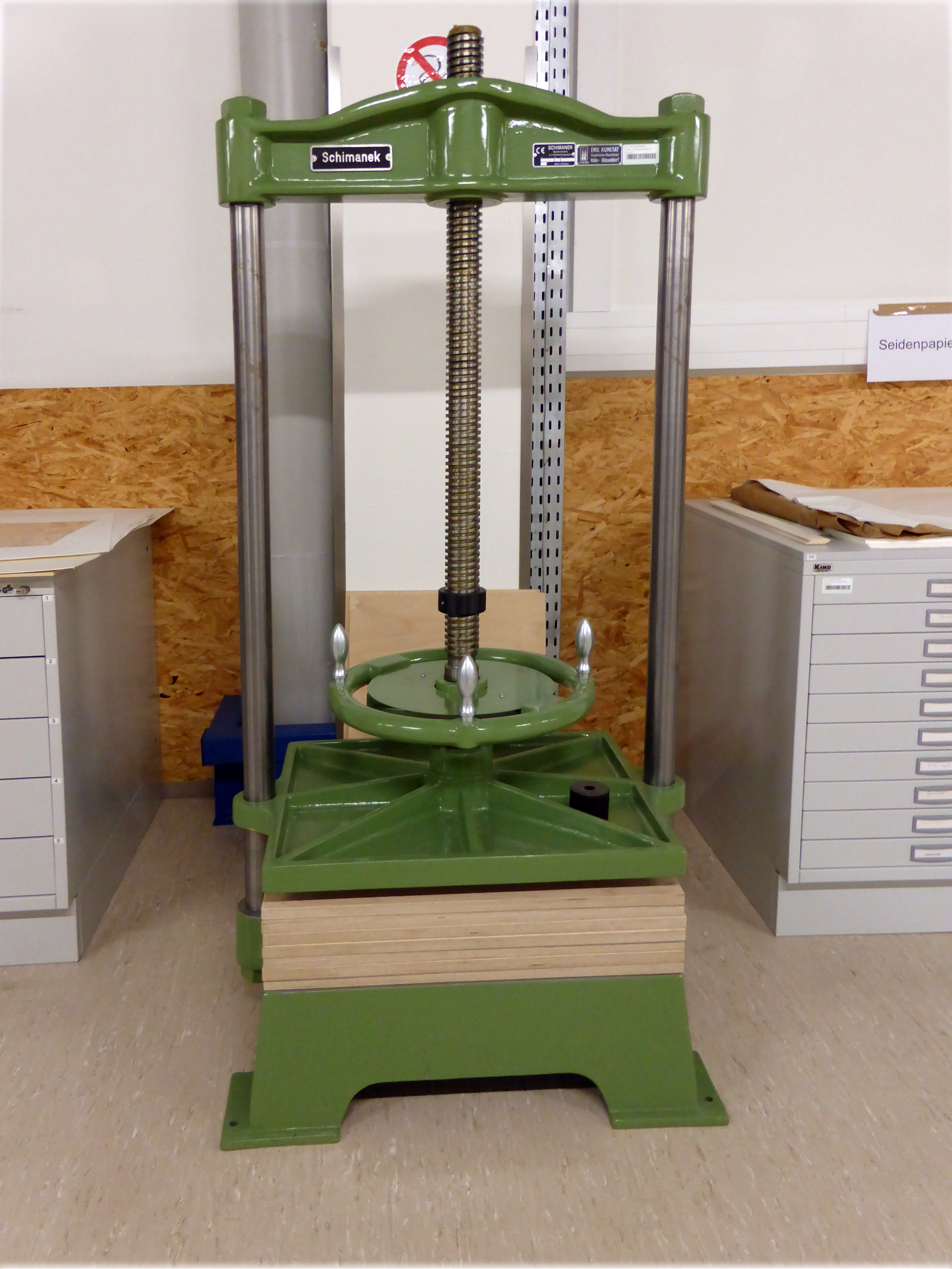 Glätt- und Packpresse im Restaurierungs- und Digitalisierungszentrum des Historischen Archivs der Stadt Köln.